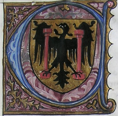 Lettre C enluminée des armes de la ville de Besançon.